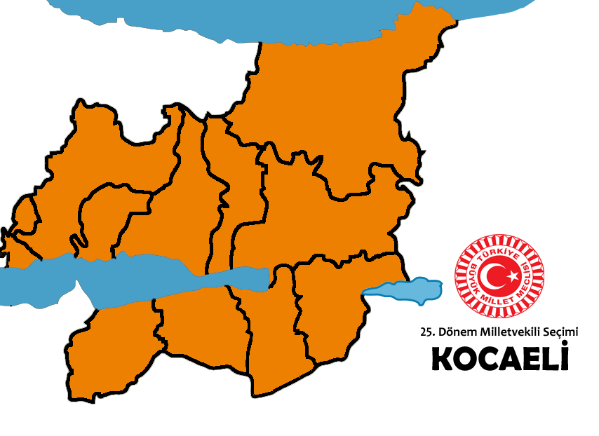 2015 genel seçim sonuçları